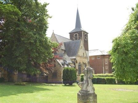 Sint-Denijskerk in Vorst